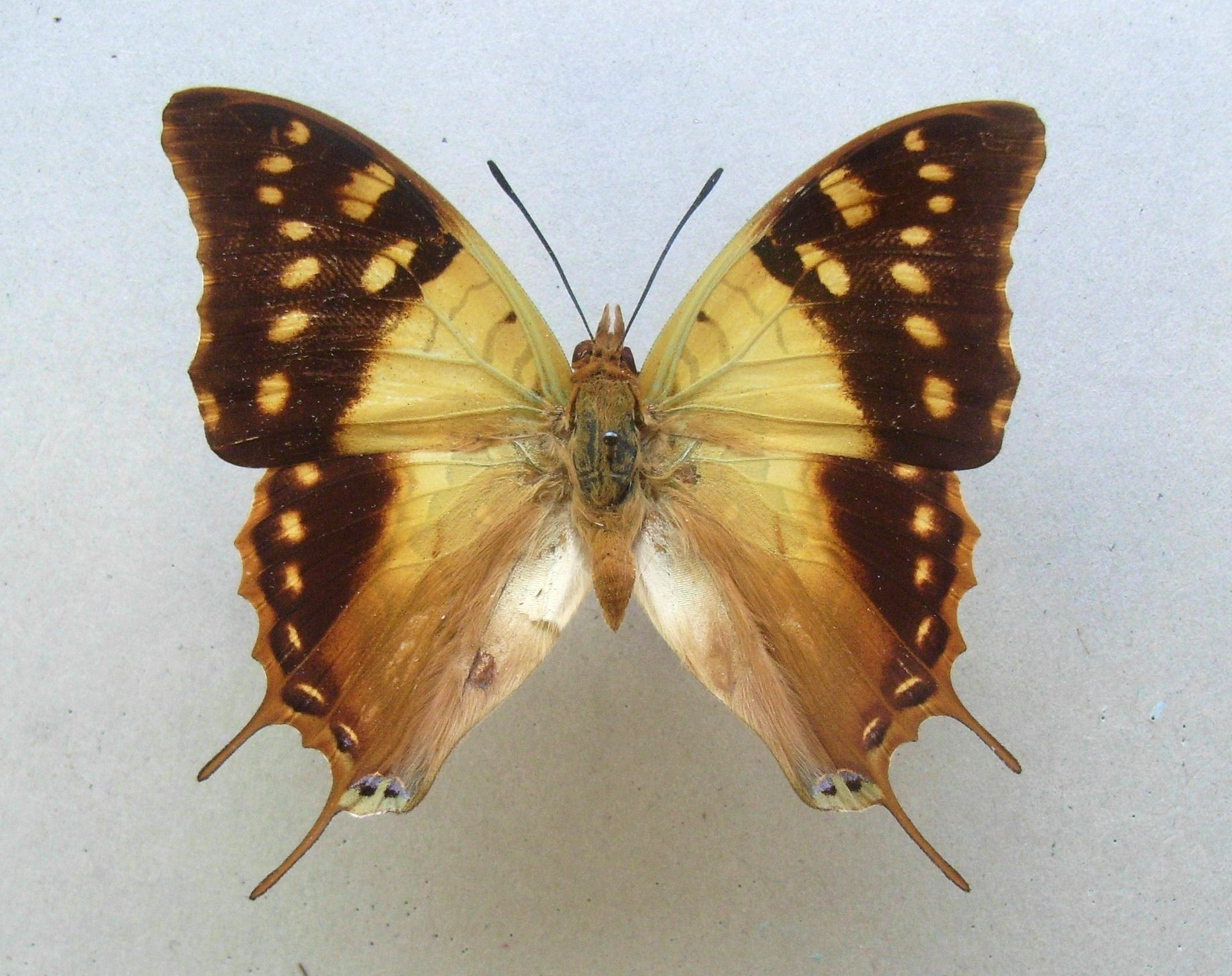 Charaxes antamboulou meridionalis ♂